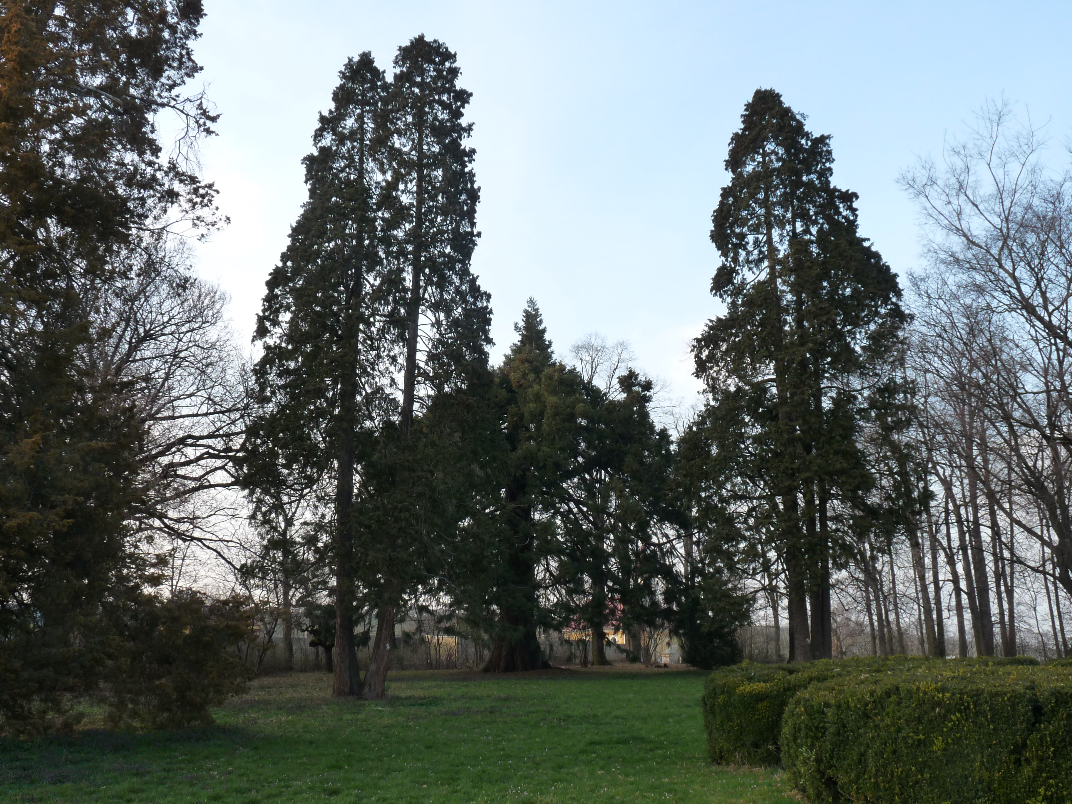 Park pri kaštieli v Tesároch